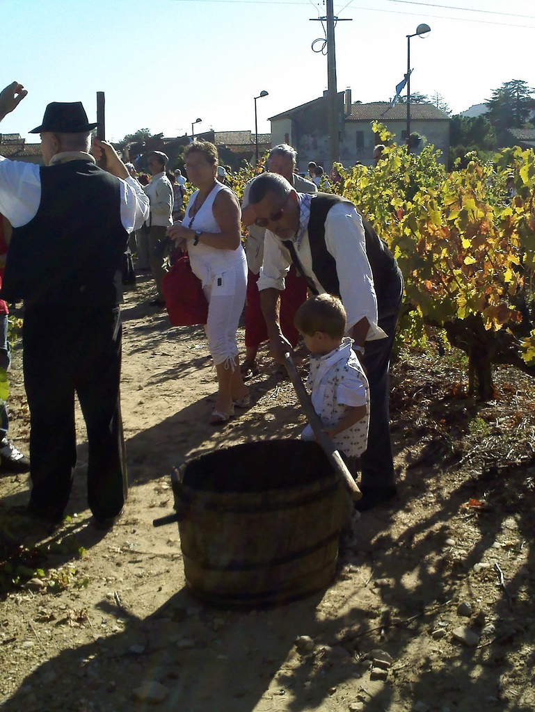 vendanges à Chusclan (Gard, France)